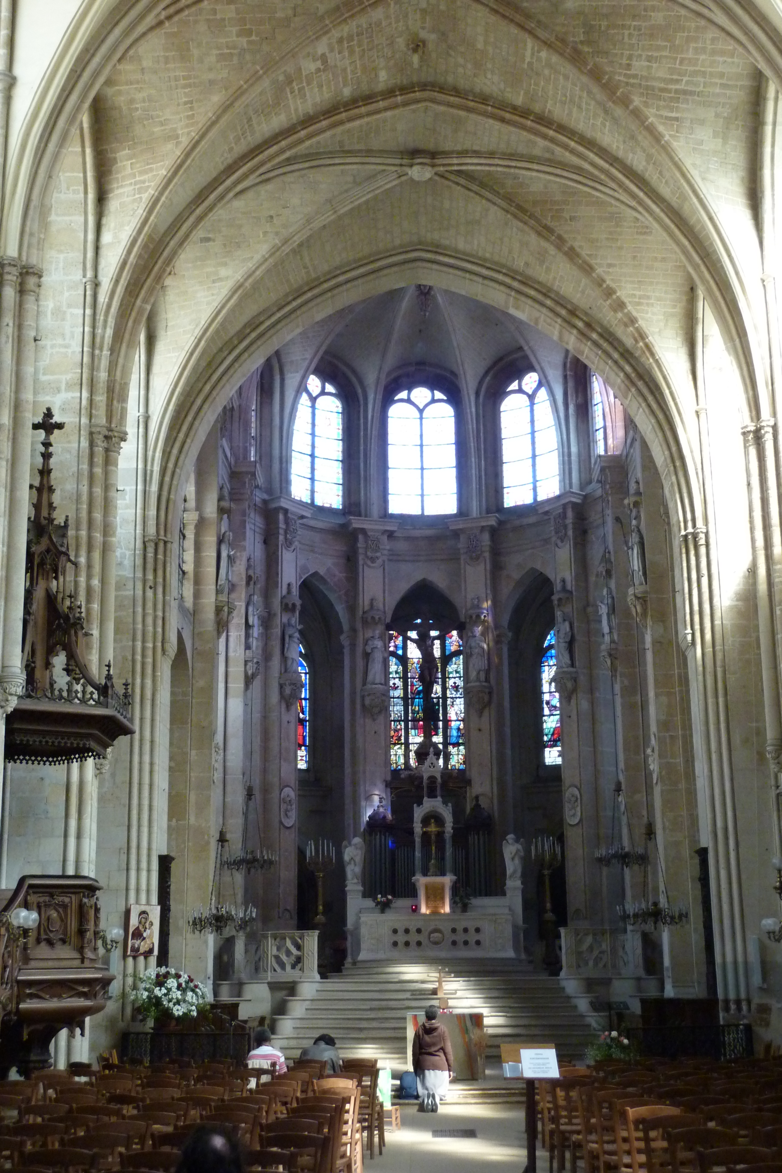 Kirche Saint-Leu-Saint-Gilles in Paris, Blick zum Chor